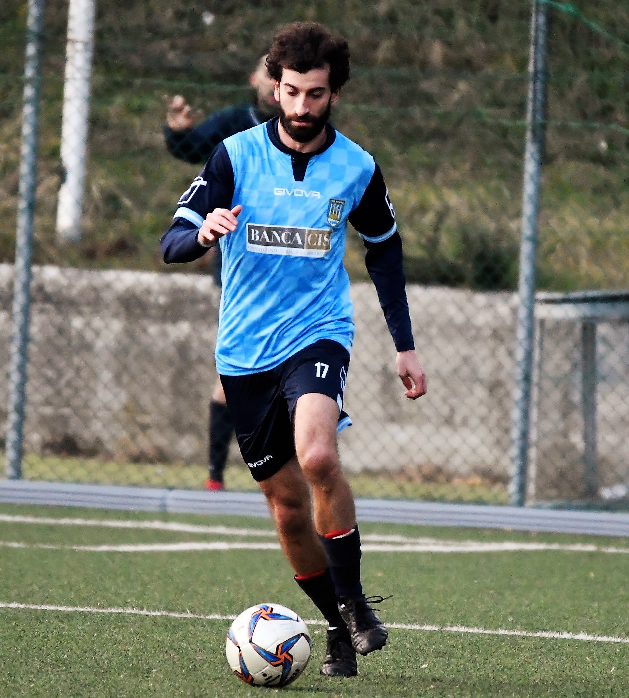 Enrico Cibelli con il Tre Penne nel 2019 nella partita contro Juvenes-Dogana